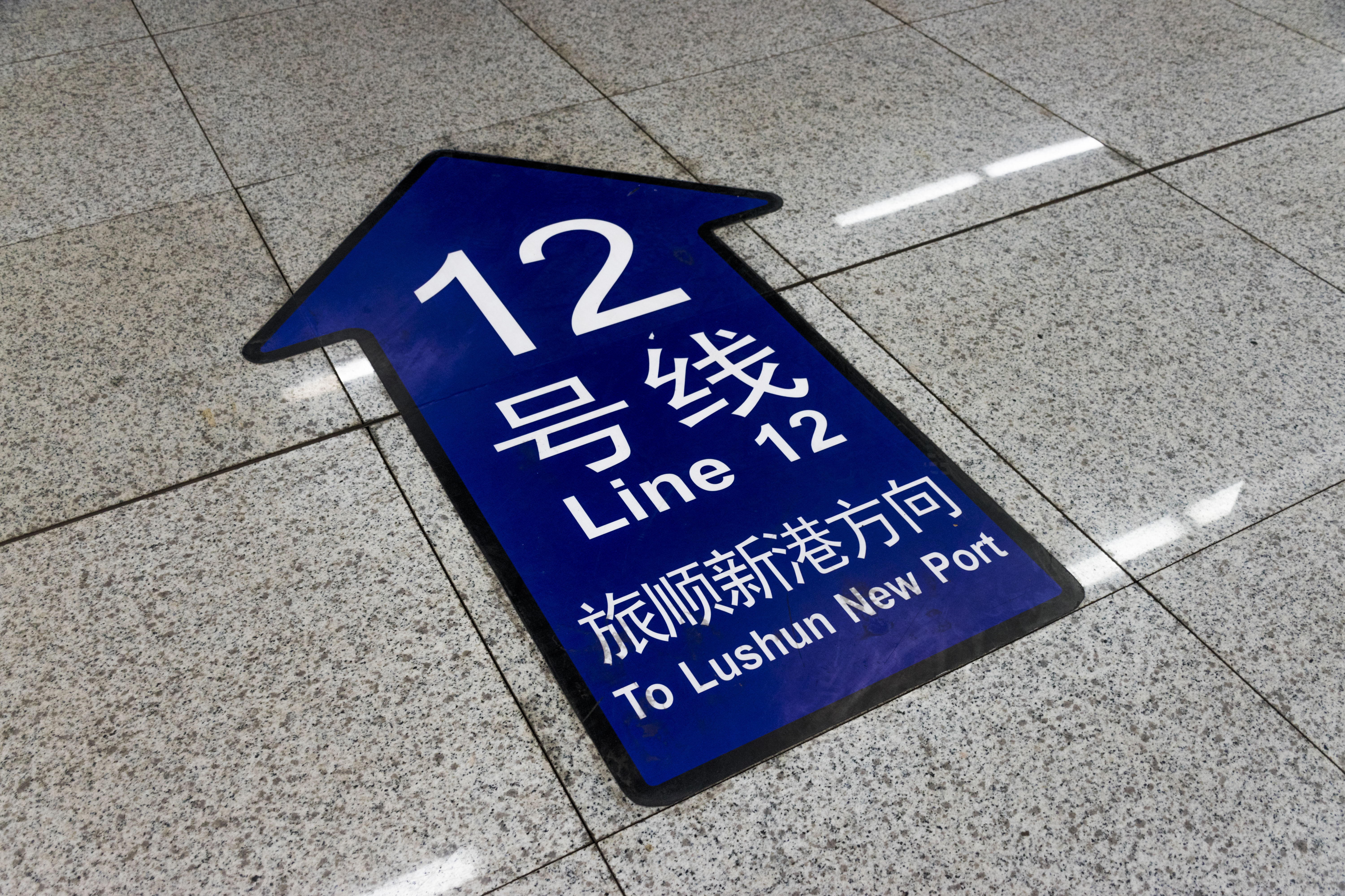 大连地铁河口站站台，换乘12号线的指引标识